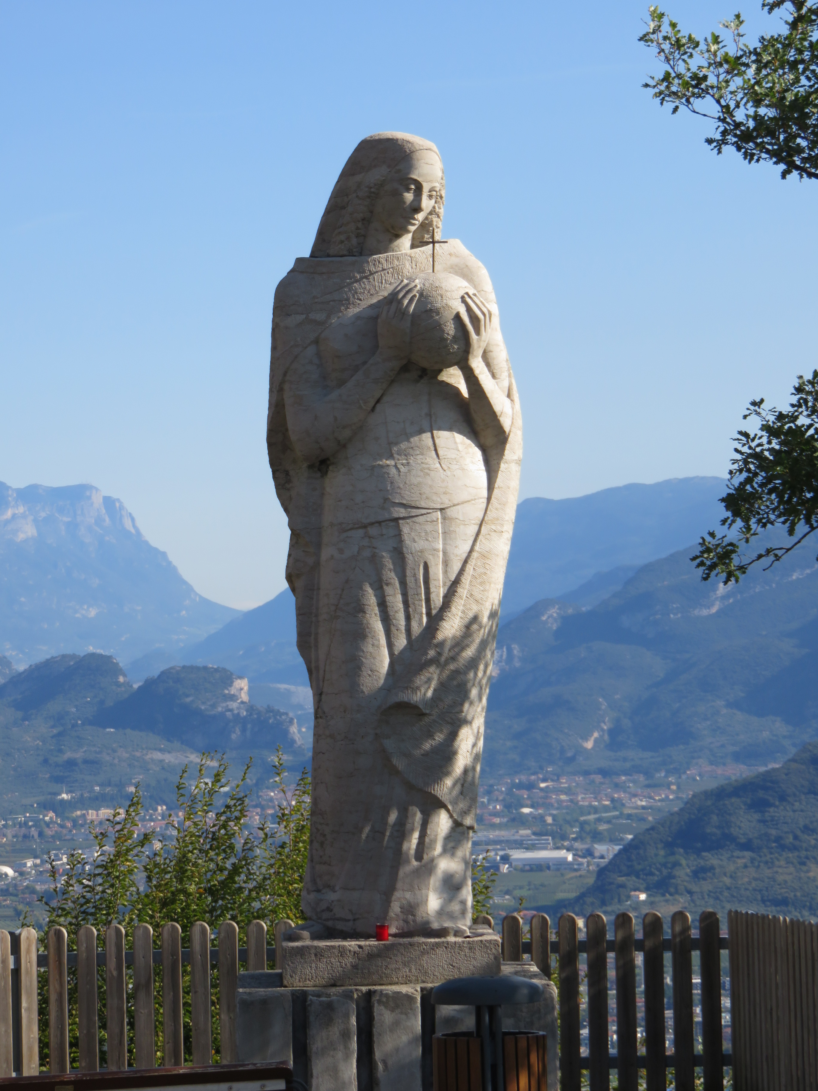 Madonnenstatue „Regina Mundi“ in Pregasina, oberhalb des Gardasees